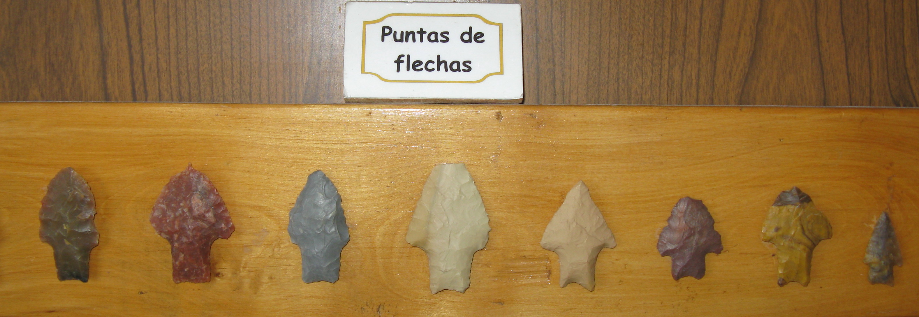 Puntas de flechas - Jaramillo - Santa Cruz - Argentina